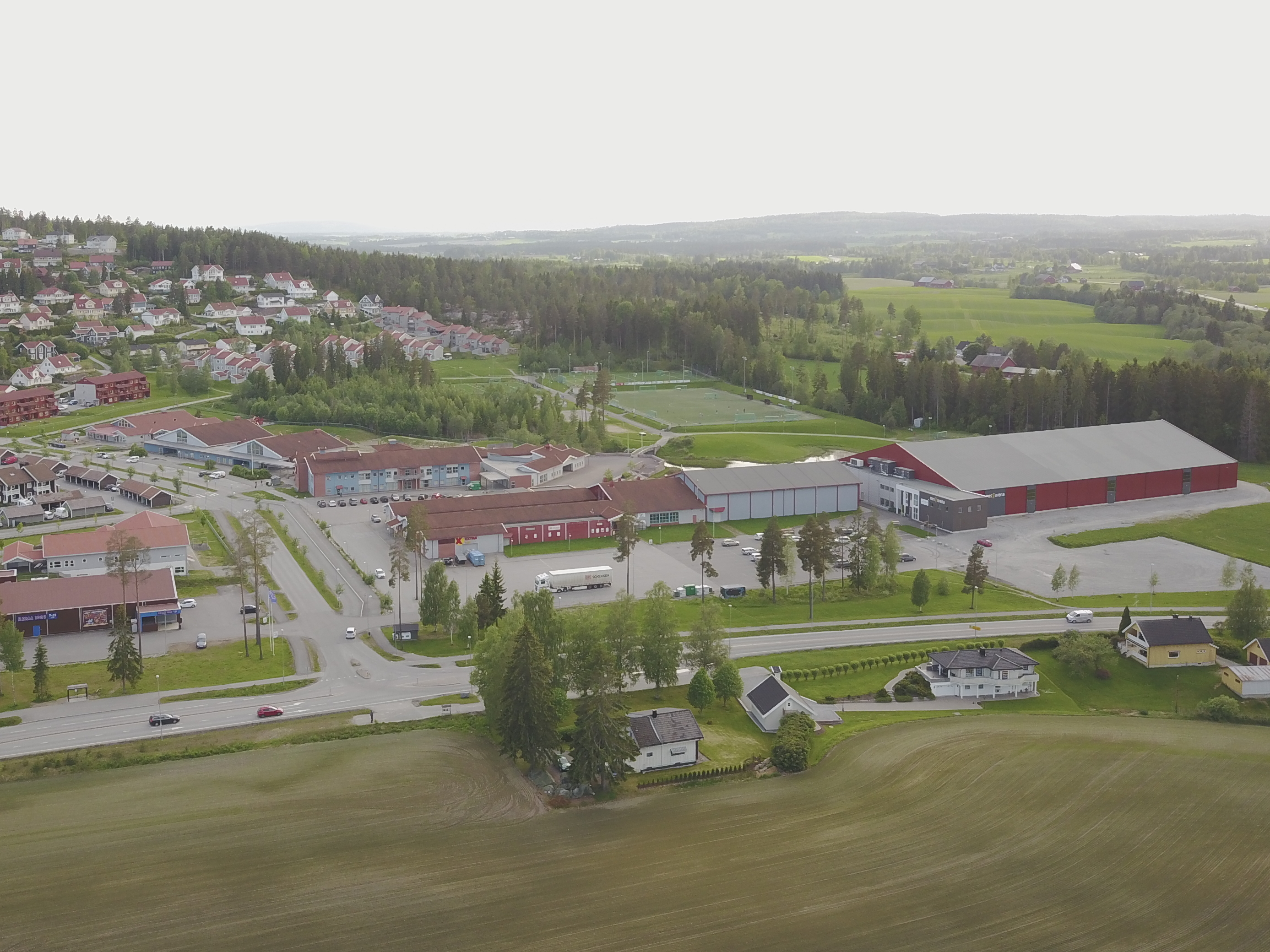 Neskollen skole på Neskollen